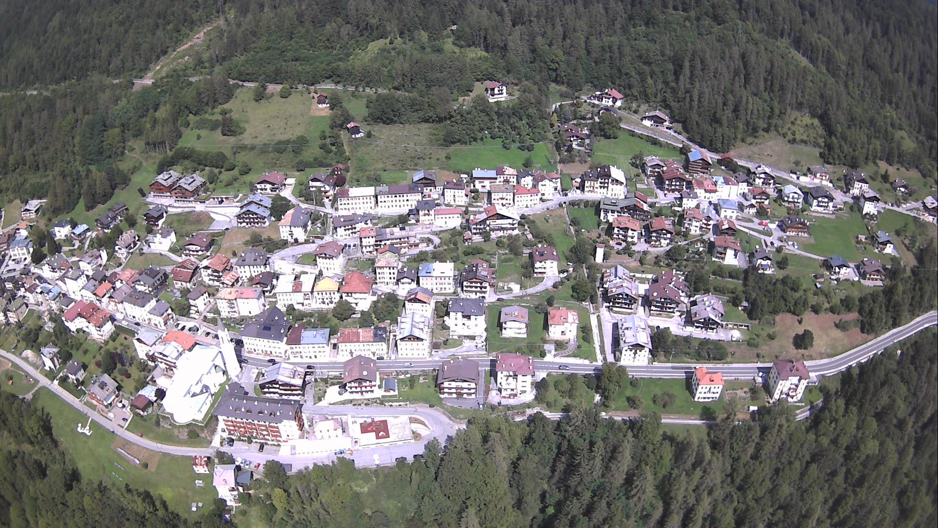 Venas di cadore dall'alto